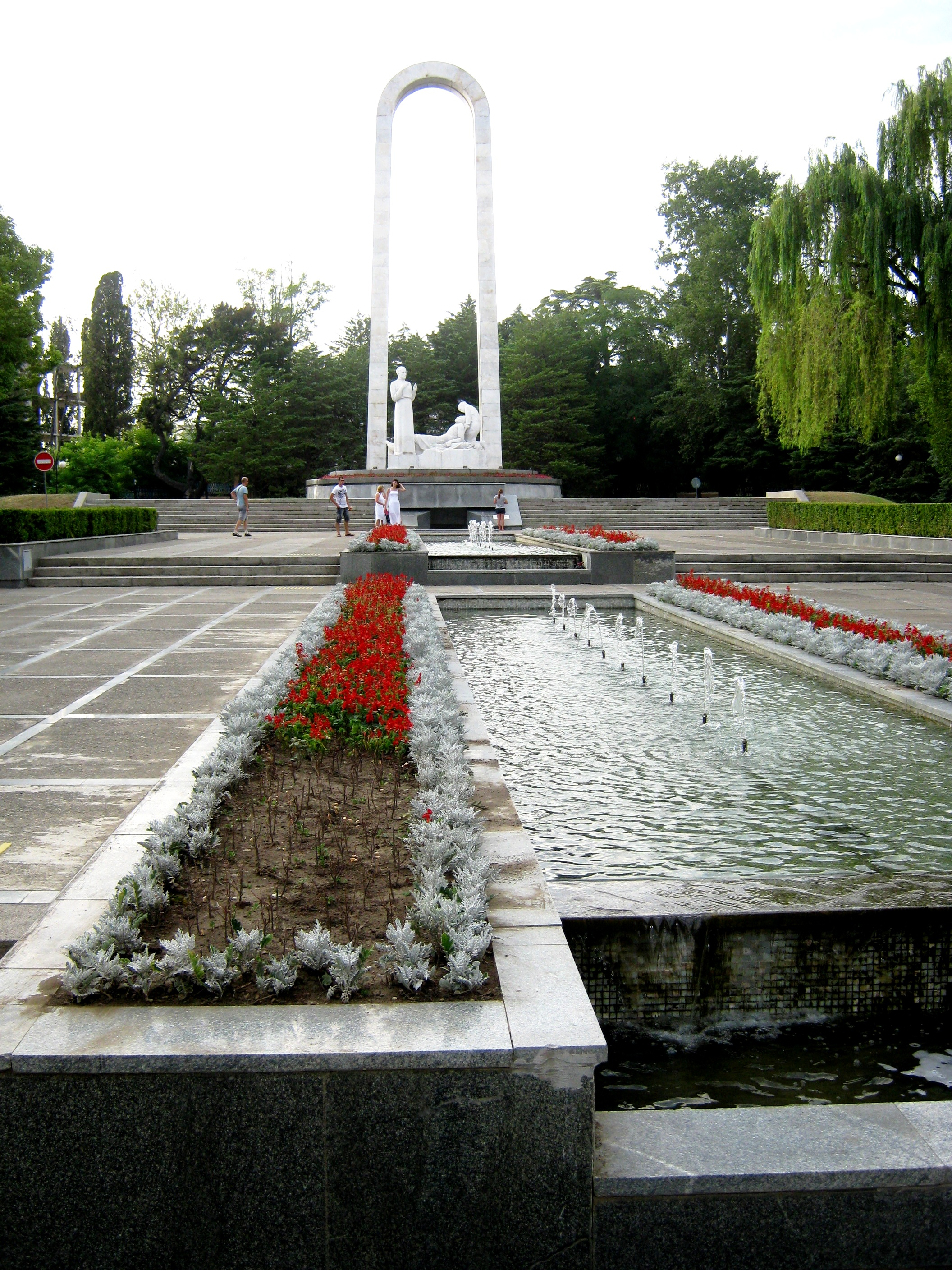 Мемориал "Подвиг во имя жизни" (Сочи)